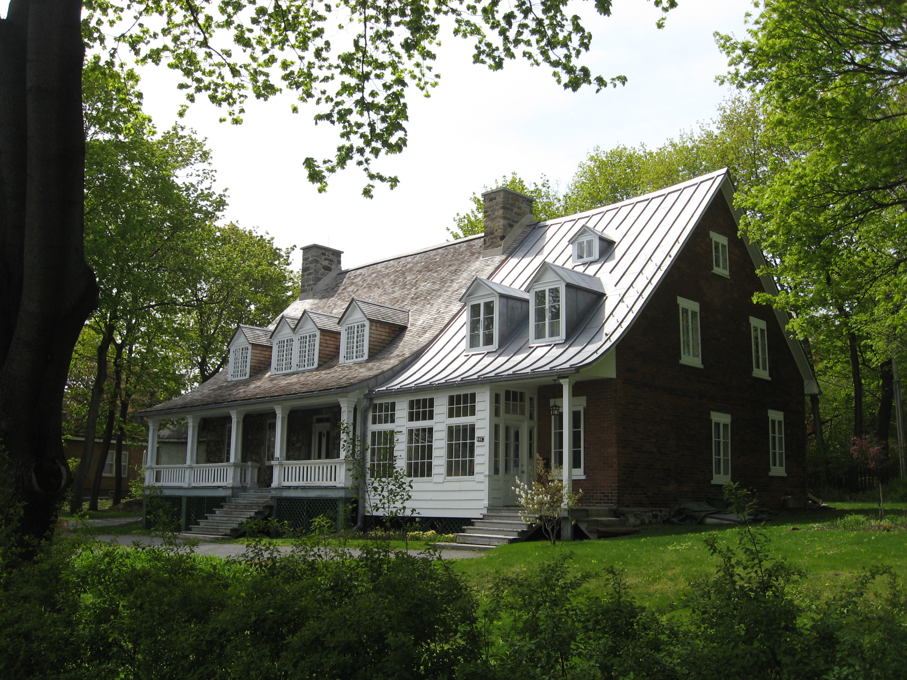 Maison Hurtubise, construite par l'un des premiers colons de Westmount (1739).